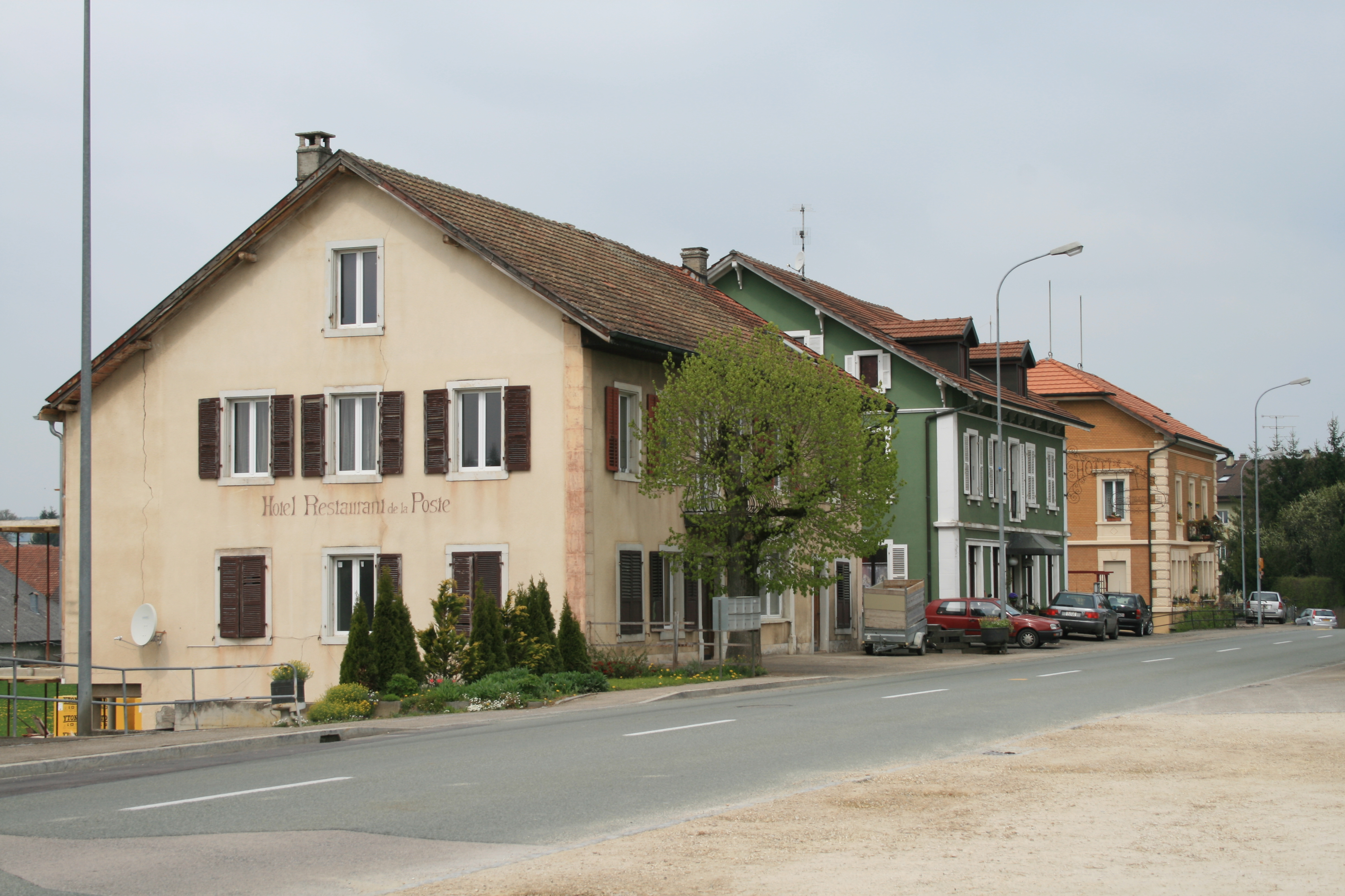 Bonfol JU, Schweiz